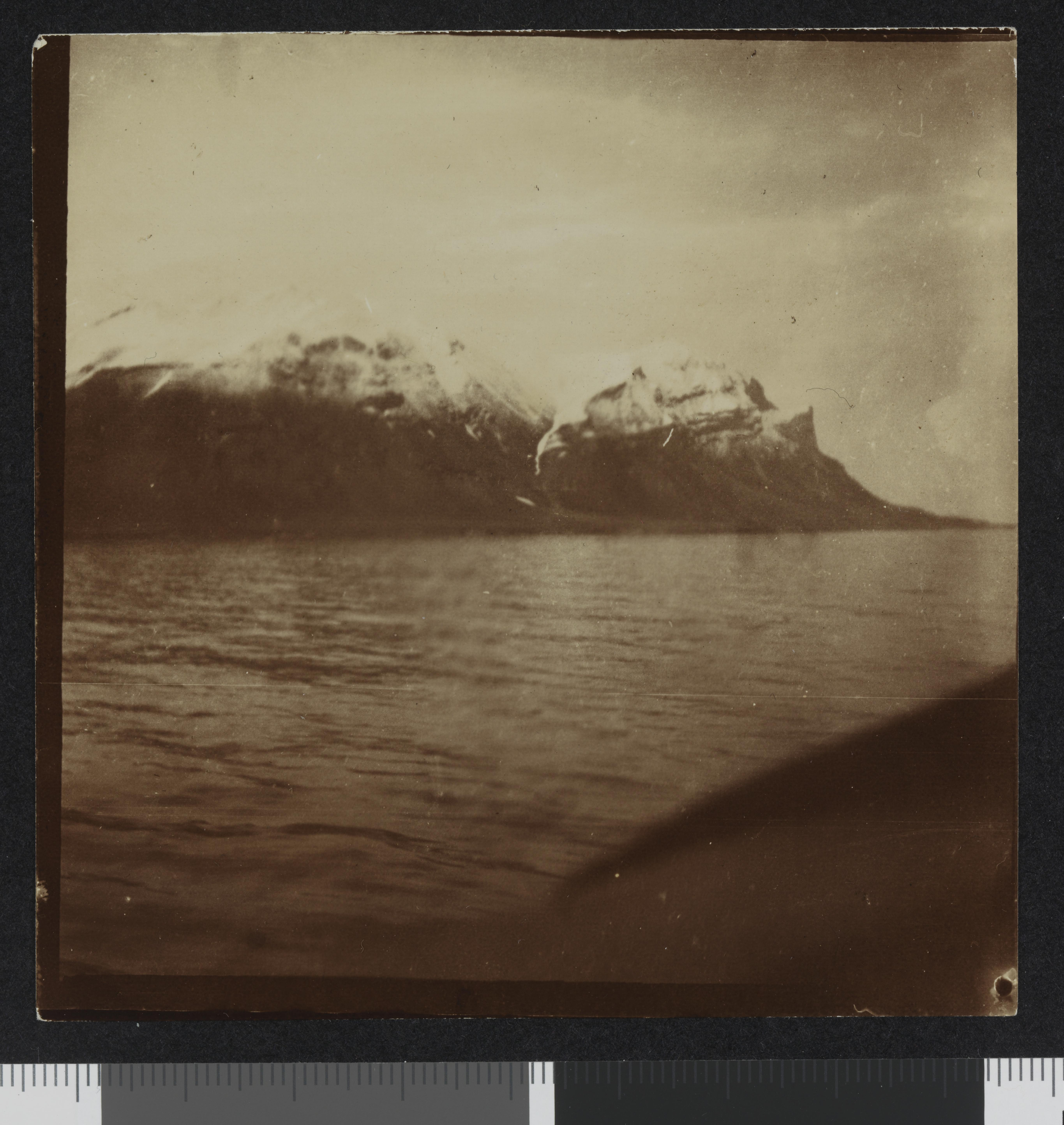 Bildet er hentet fra Nasjonalbibliotekets bildesamling. Anmerkninger til bildet var: Tittel tatt fra fotografiets bakside Alkhornet,Isfjorden